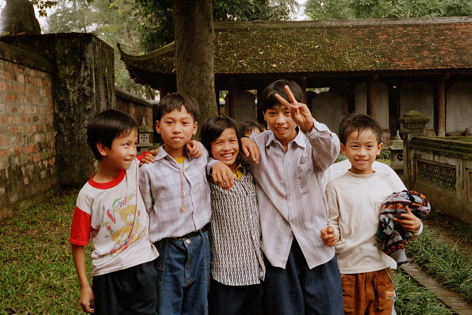 Children in Hanoi